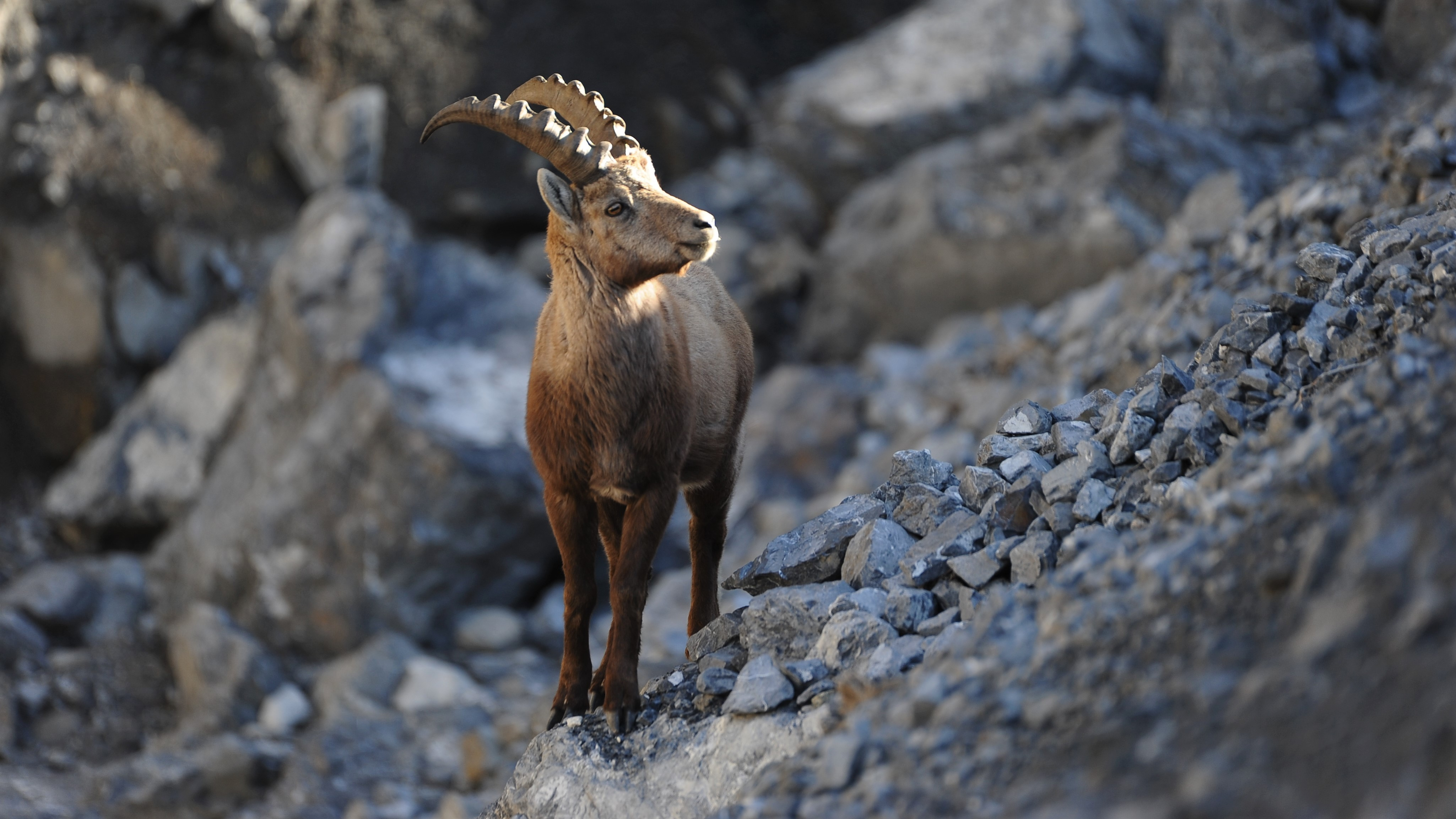 Valle della Forcola (Q49960608)